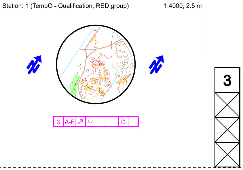 Svazek takovýchto map dostává závodník na časovce nebo TempO stanovišti, postupně úlohy z mapy řeší a odpovídá.